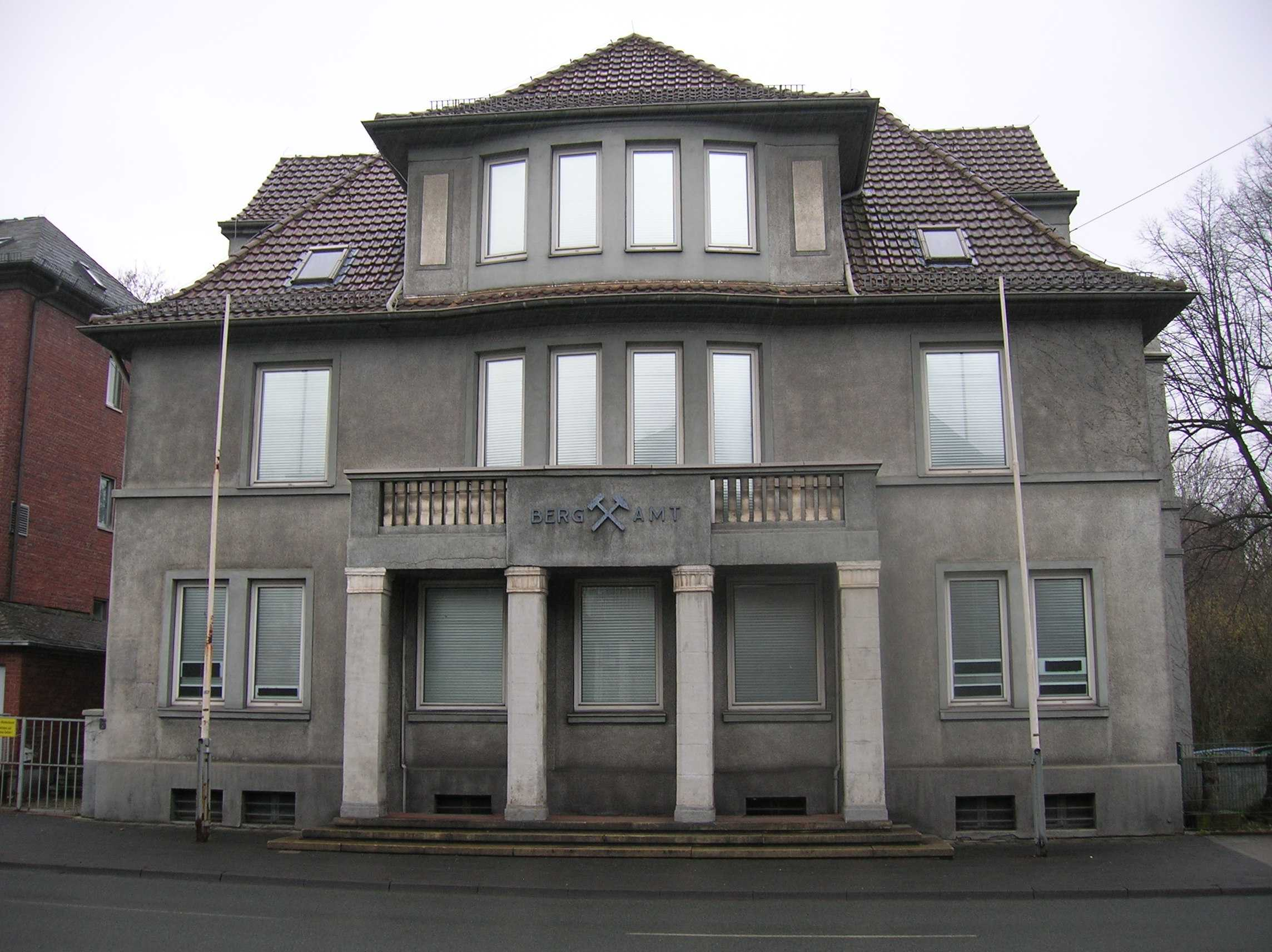 Reichsbank und Bergamt in Goethestraße in Hamm, 2011